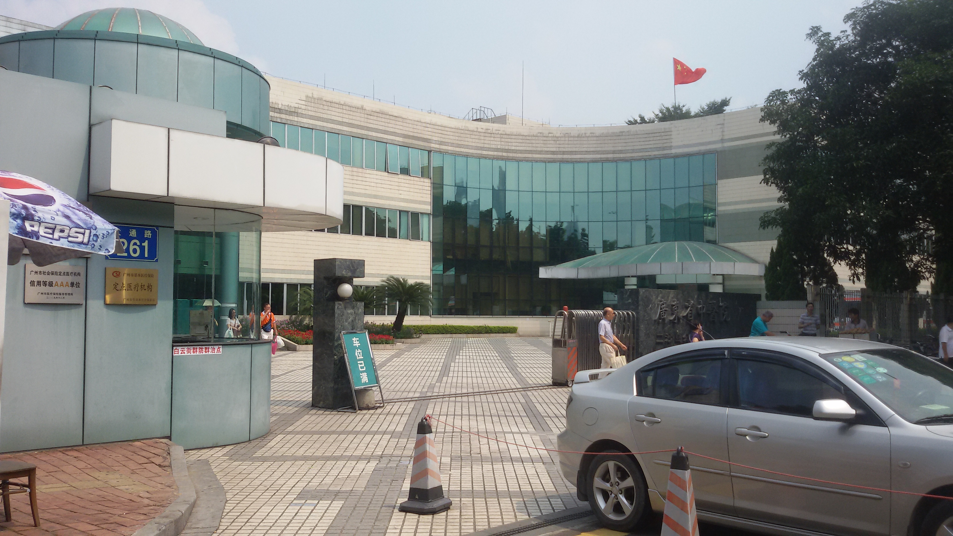 粵語: 廣東省中醫院（二沙島院區）